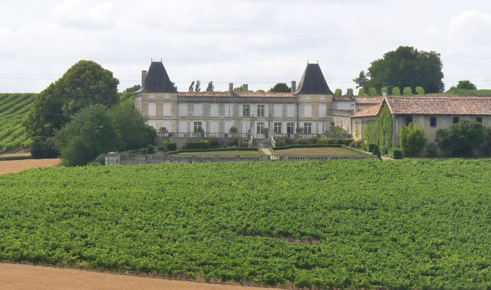 Château de la Chapelle, Champmillon, Charente, France; le domaine et la terrasse